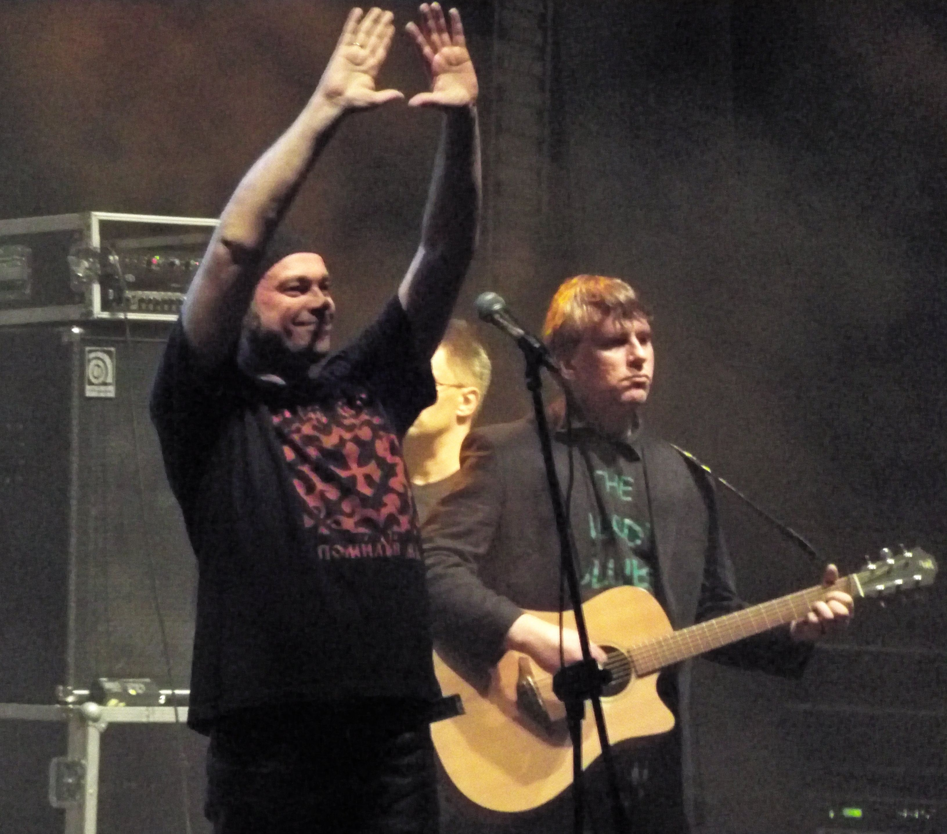 Koncert zespołu Armia w Amfiteatrze w Parku Górczewska w Warszawie z okazji Dnia Wolnego Wyboru, 4 czerwca 2012. Na pierwszym planie Tomasz Budzyński i Gerard Nowak, na drugim Paweł Piotrowski